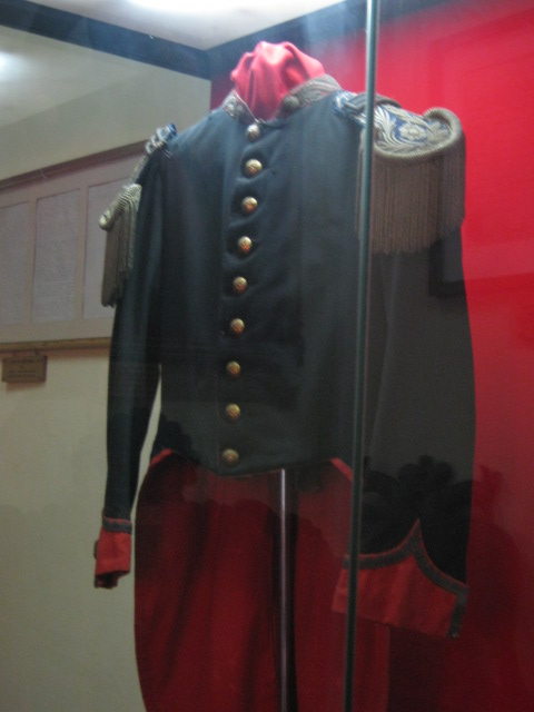 Ropa usada por francisco bolognesi coronel